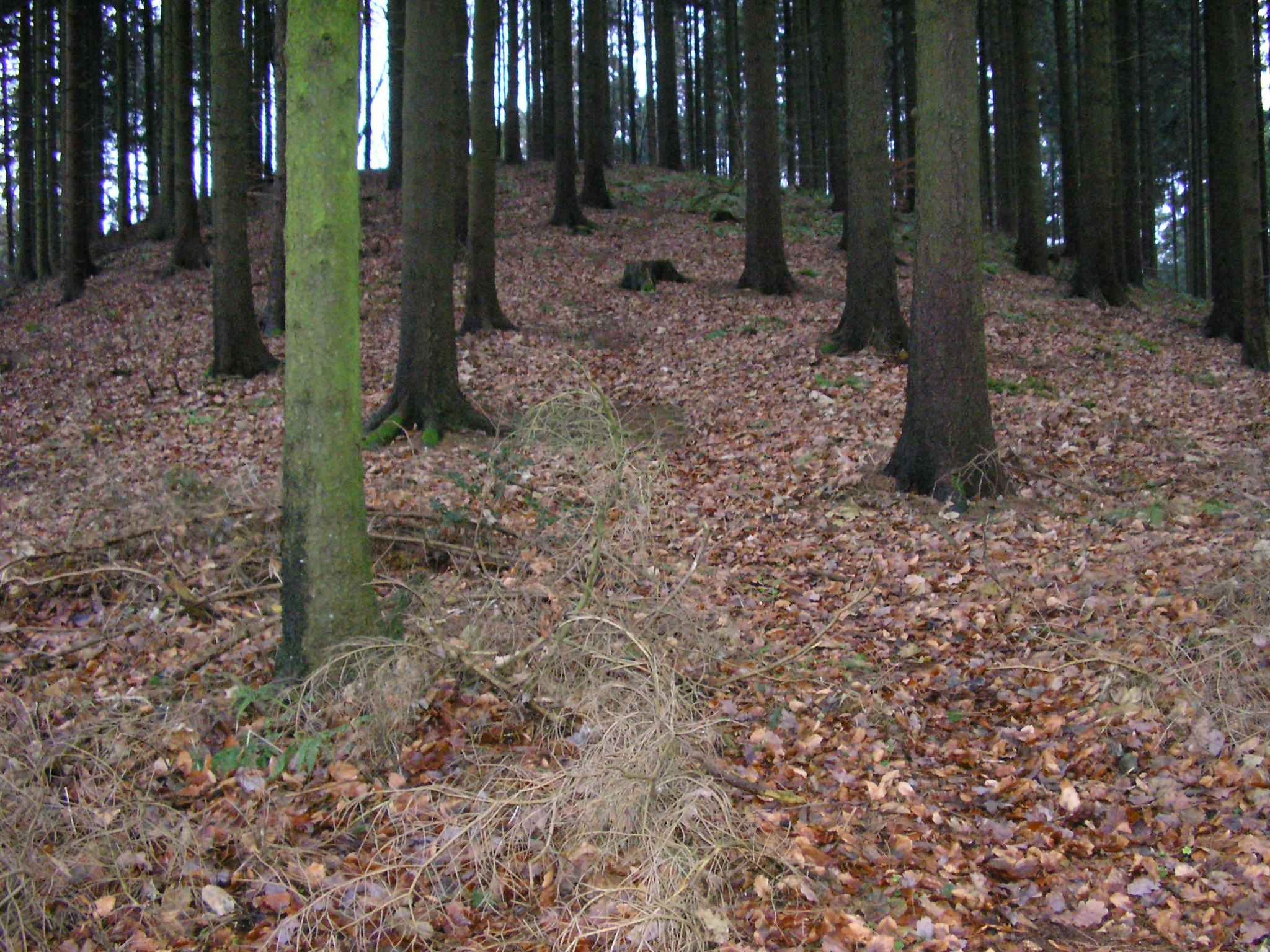 Falk Oberdorf Pfad auf den Gipfel des Meesenkopf